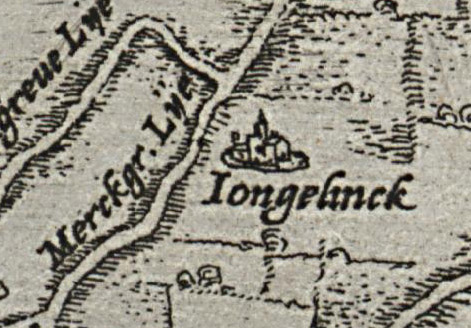 Ausschnitt aus einer Karte der Umgebung Antwerpens mit dem Eintrag Iongelinck. Es handelt sich um den Landsitz „T’goet terbeke“ des Kaufmannes und Kunstsammlers Nicolaes Jonghelinck.[1]